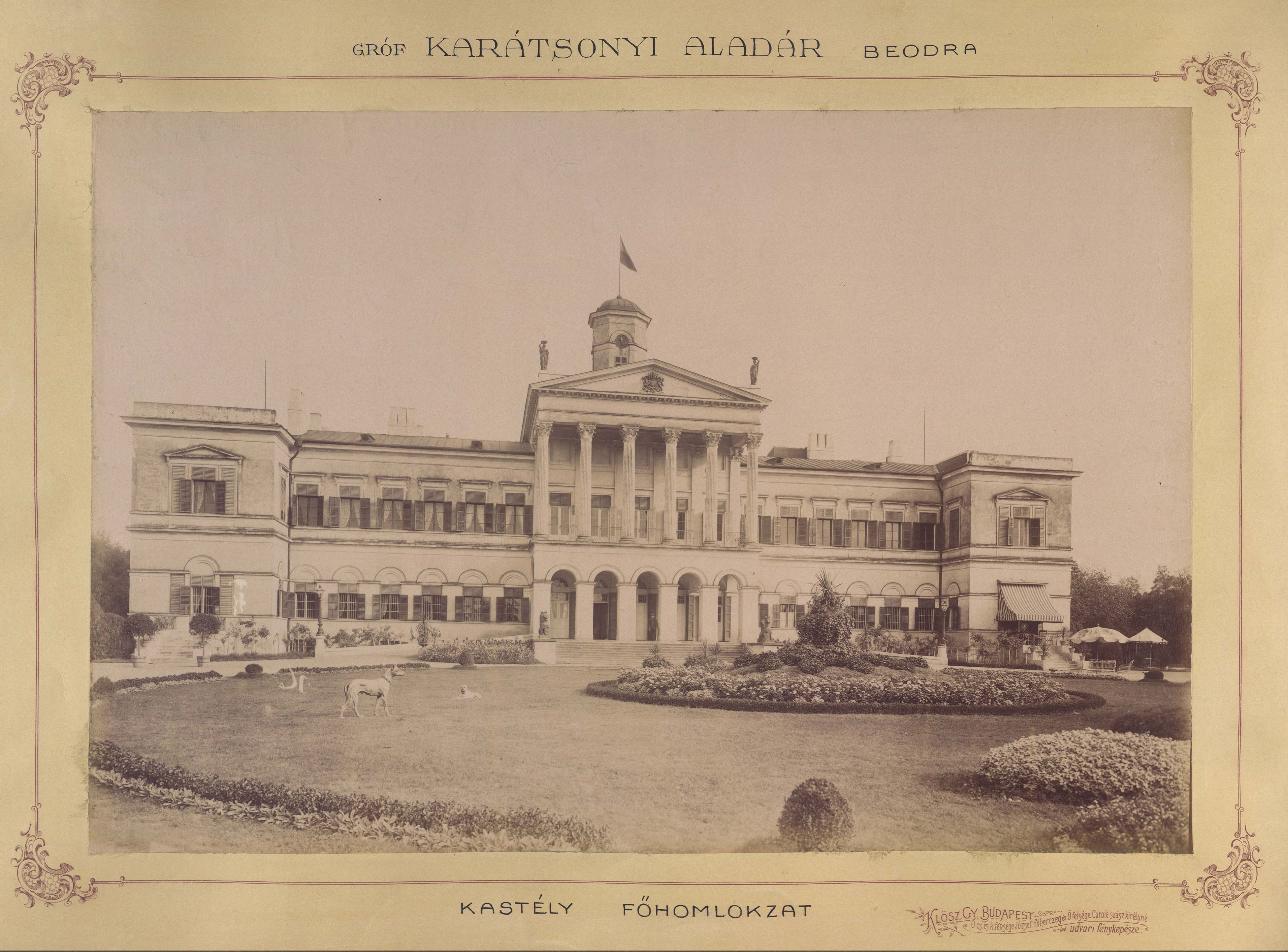 a Karácsonyi-kastély főhomlokzata. A felvétel 1895-1899 között készült. A kép forrását kérjük így adja meg: Fortepan / Budapest Főváros Levéltára. Levéltári jelzet: HU.BFL.XV.19.d.1.12.143 Location: Serbia, Novo Miloševo Tags: castle